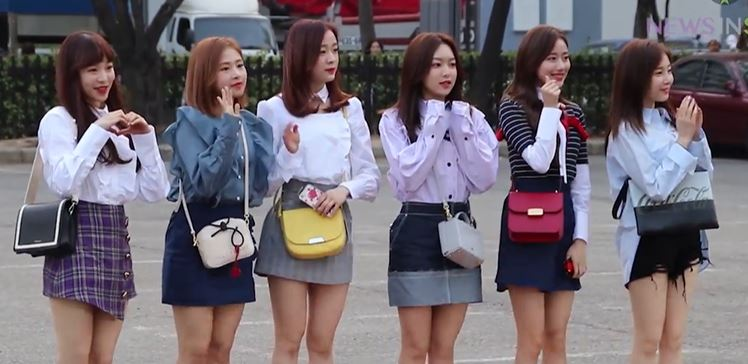 180330 뮤직뱅크 리허설 출근길 풍경 입니다.